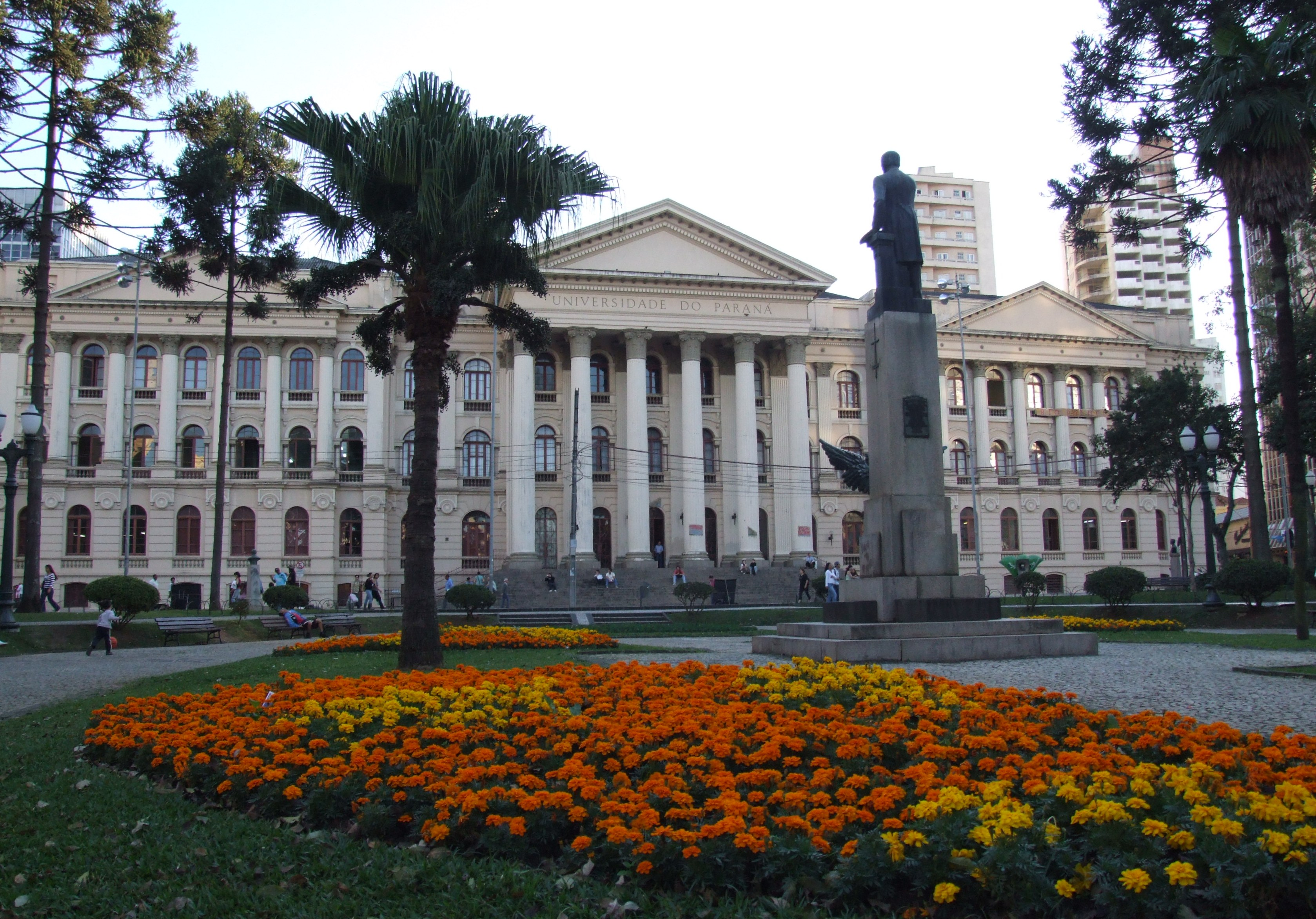 A Universidade Federal do Paraná é a segunda mais antiga universidade do Brasil e a primeira da Região Sul do Brasil.